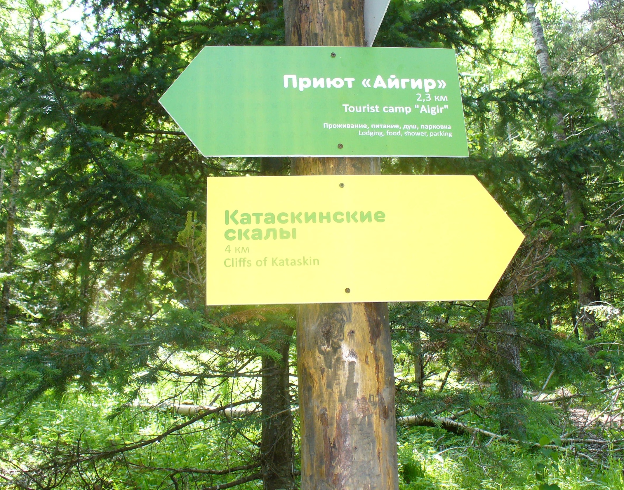 Указатель на Катаскинские скалы. Белорецкий район